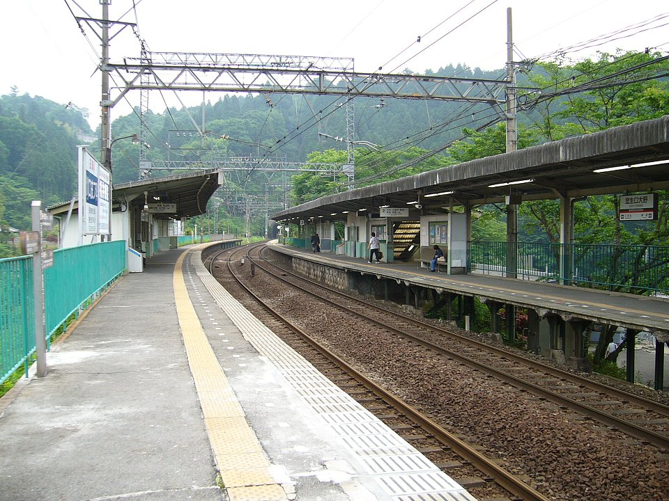 近鉄室生口大野駅 ホーム